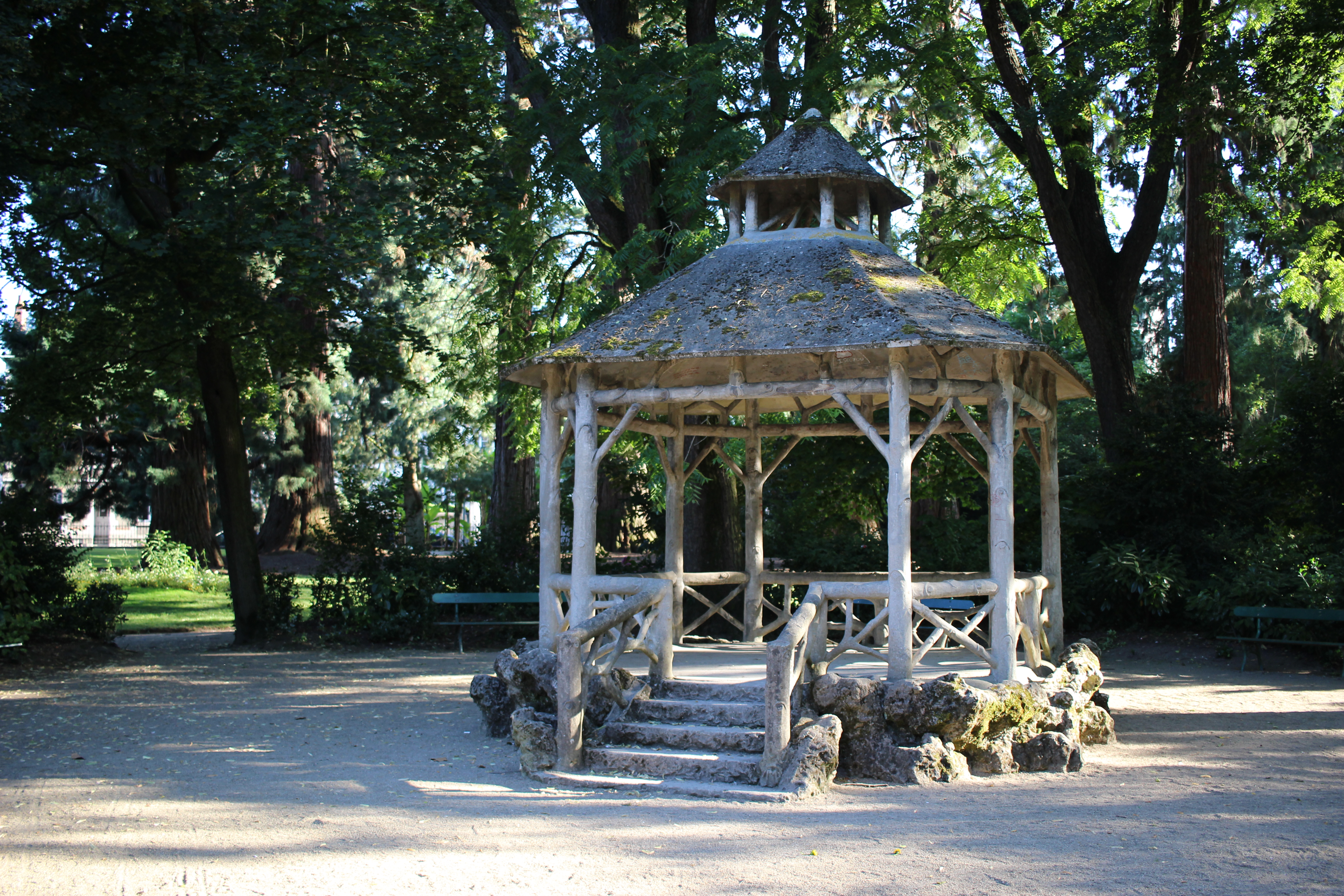 Le petit kiosque, dans le Jardin des Prébendes de Tours (France).